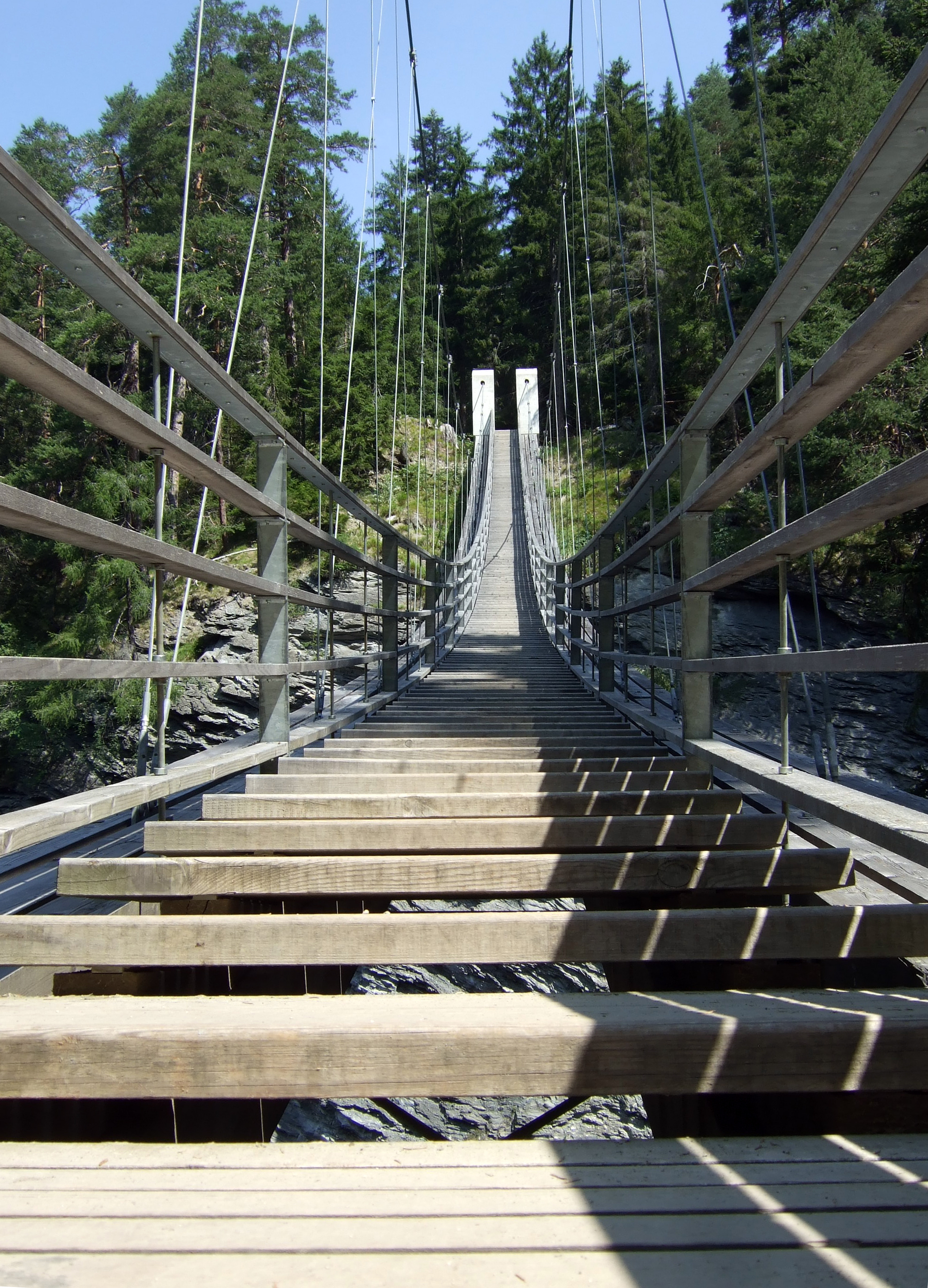 Der Traversinersteg auf der Via Spluga in der Via Mala-Schlucht, Graubünden